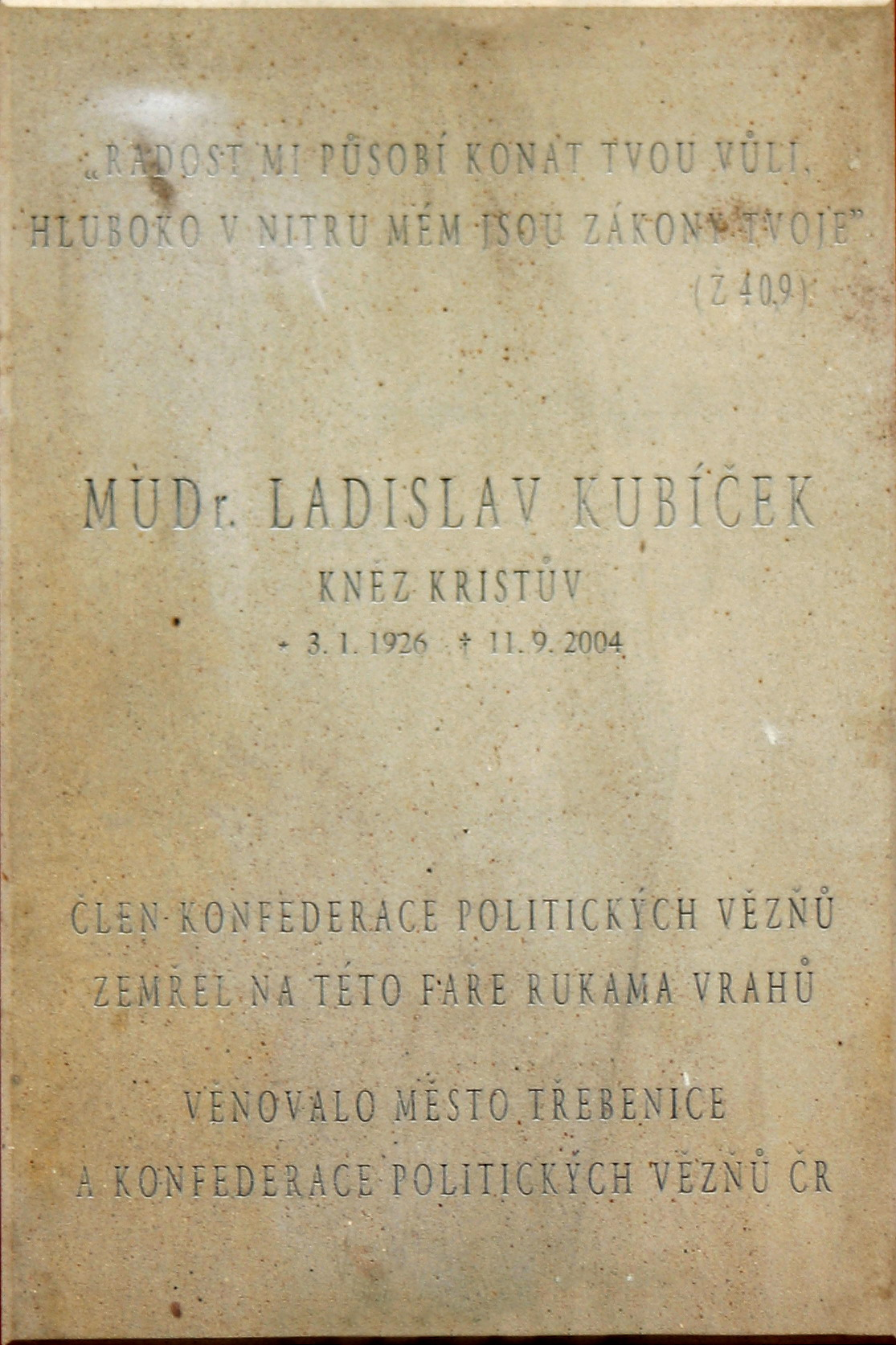 Pamětní deska zavražděnému P. MUDr. Ladislavu Kubíčkovi. Autorem je akad. sochař Libor Pisklák